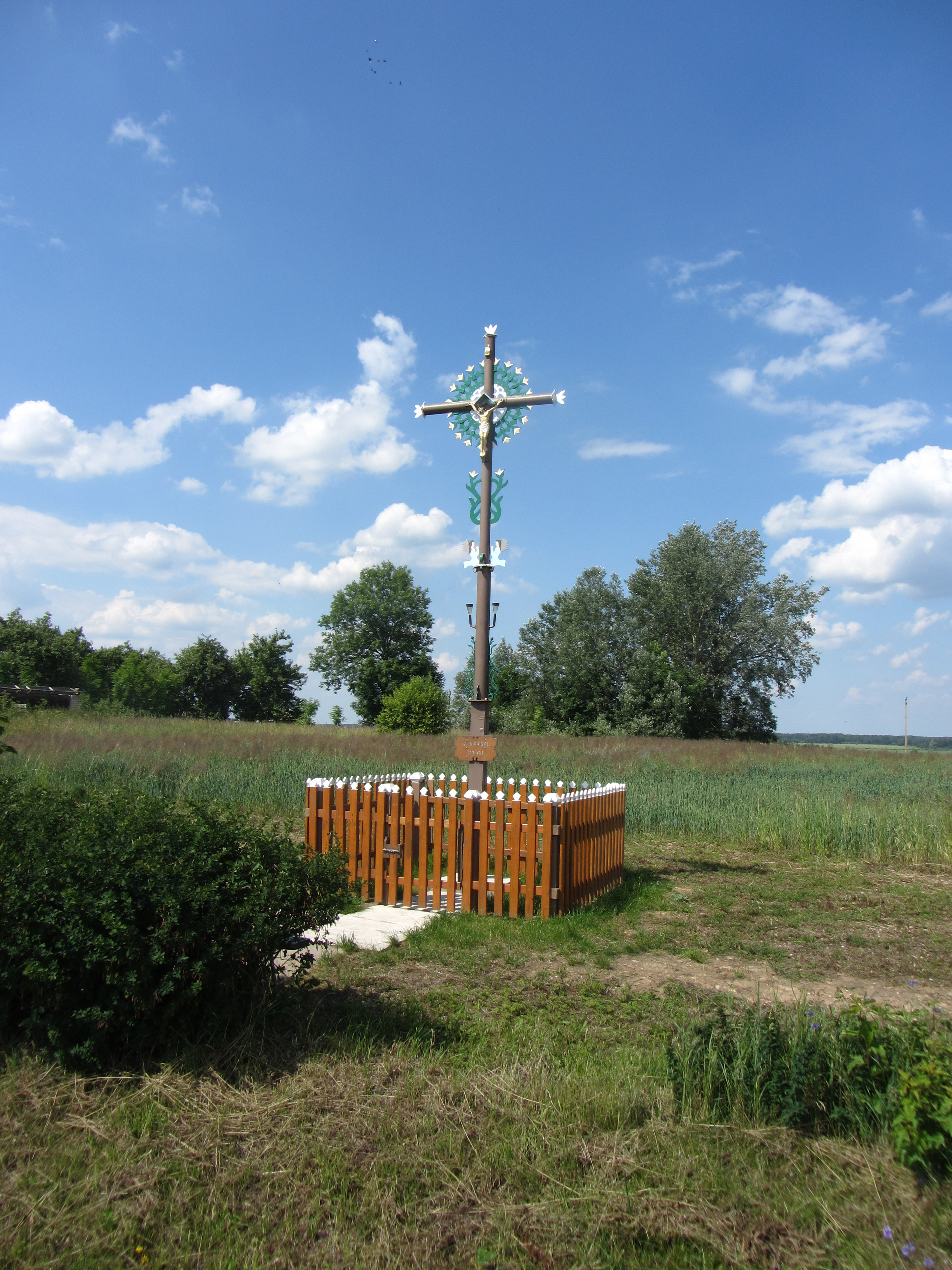 Navikai, Lithuania